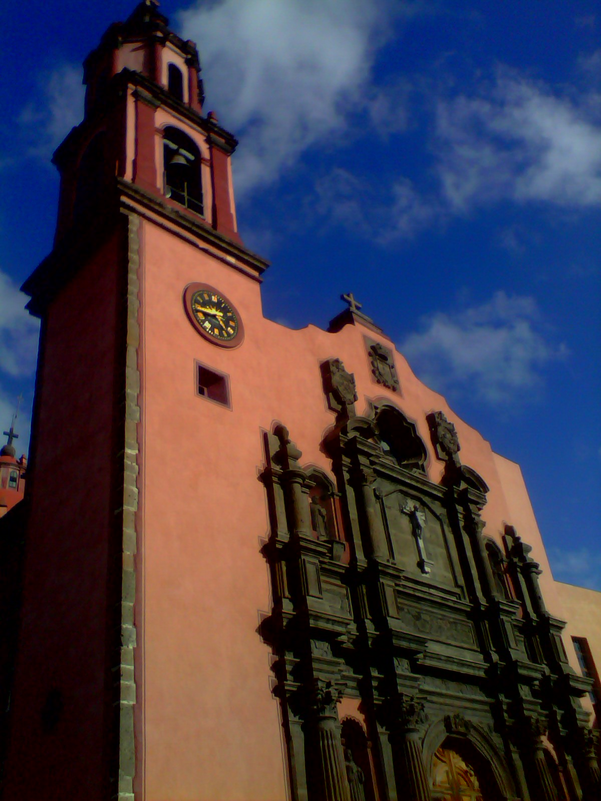 Templo de la mision de santo domingo en san juan del rio